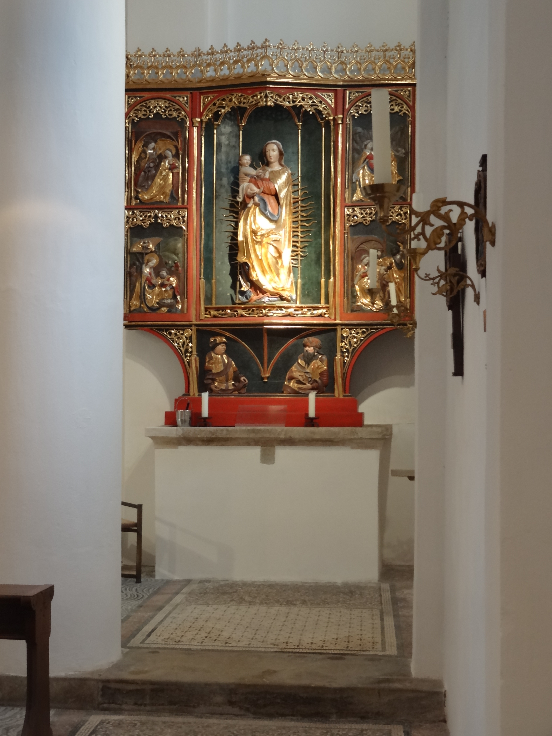 Spätgotischer Marienaltar (um 1505) in der Filialkirche St. Leonhard in Regensburg